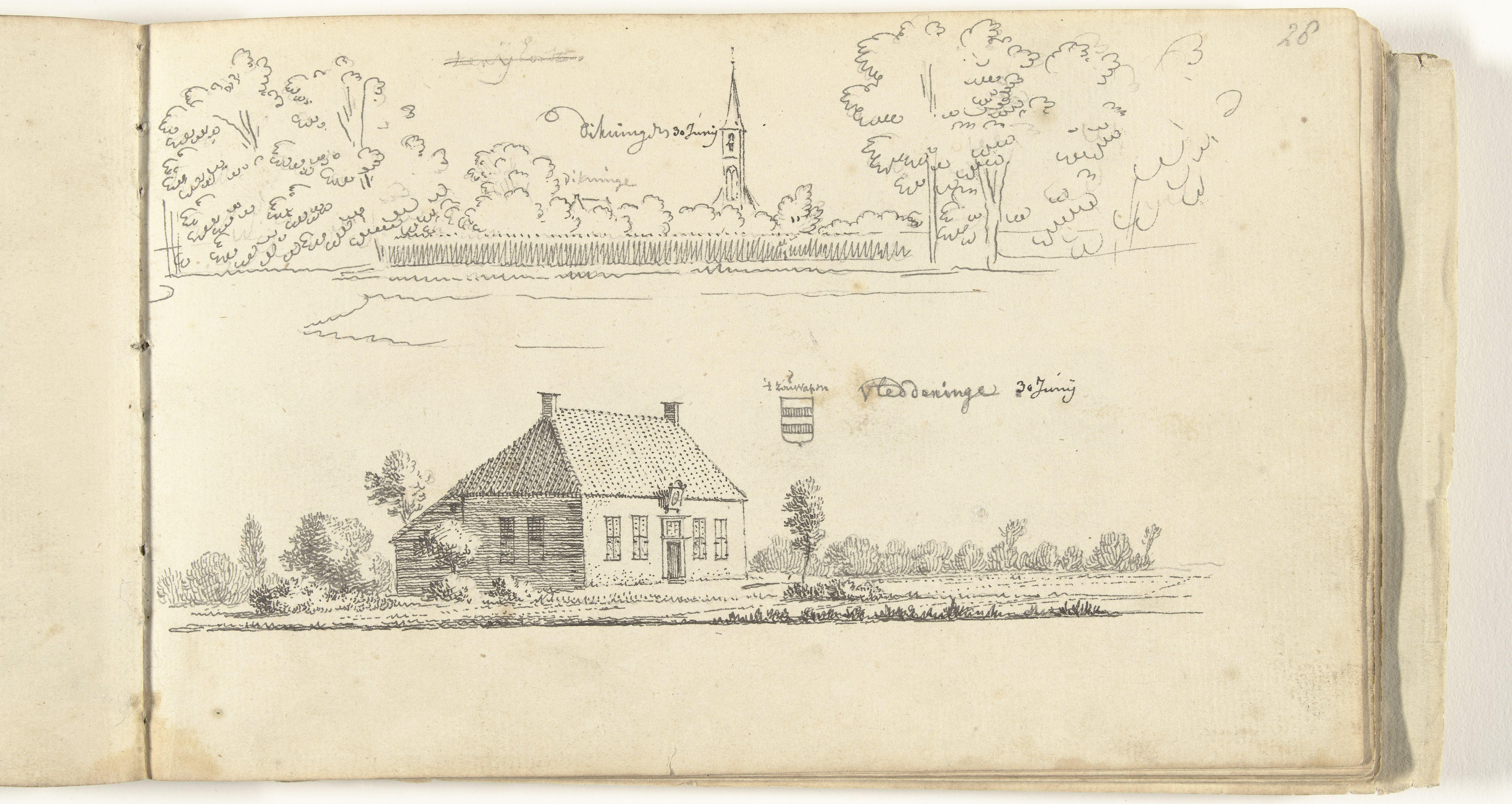 h 128mm × b 207mm. Objecttype: tekening / schetsboek. Kunstenaar: tekenaar: Abraham de Haen (II) (Amsterdam 6-apr-1707 - Amsterdam 8-aug-1748) tekenaar: Cornelis Pronk (verworpen toeschrijving) (Amsterdam 10-dec-1691 - Amsterdam 29-sep-1759). Vervaardigd te Meppel, 30 juni 1732. Aangekocht door Rijksmuseum in 1891. Publiek domein.